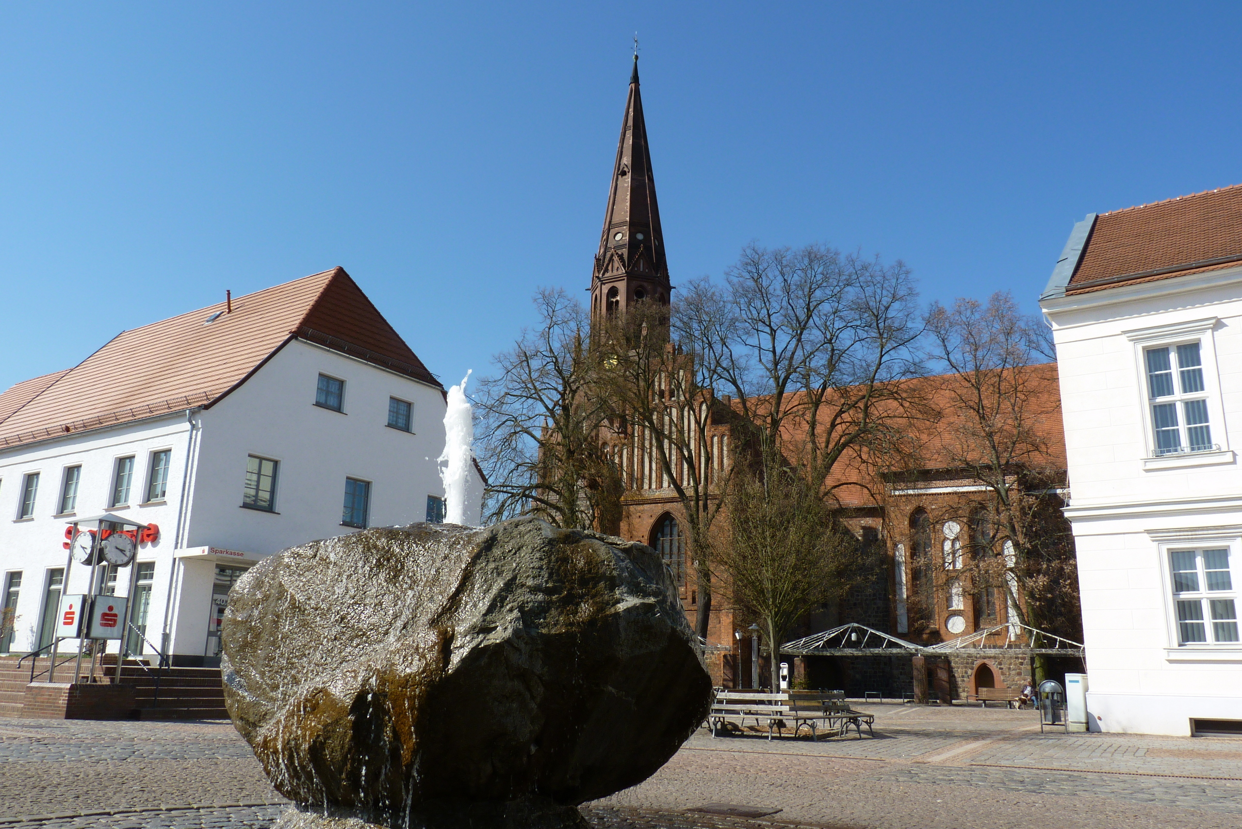 Der Marktplatz in Pritzwalk